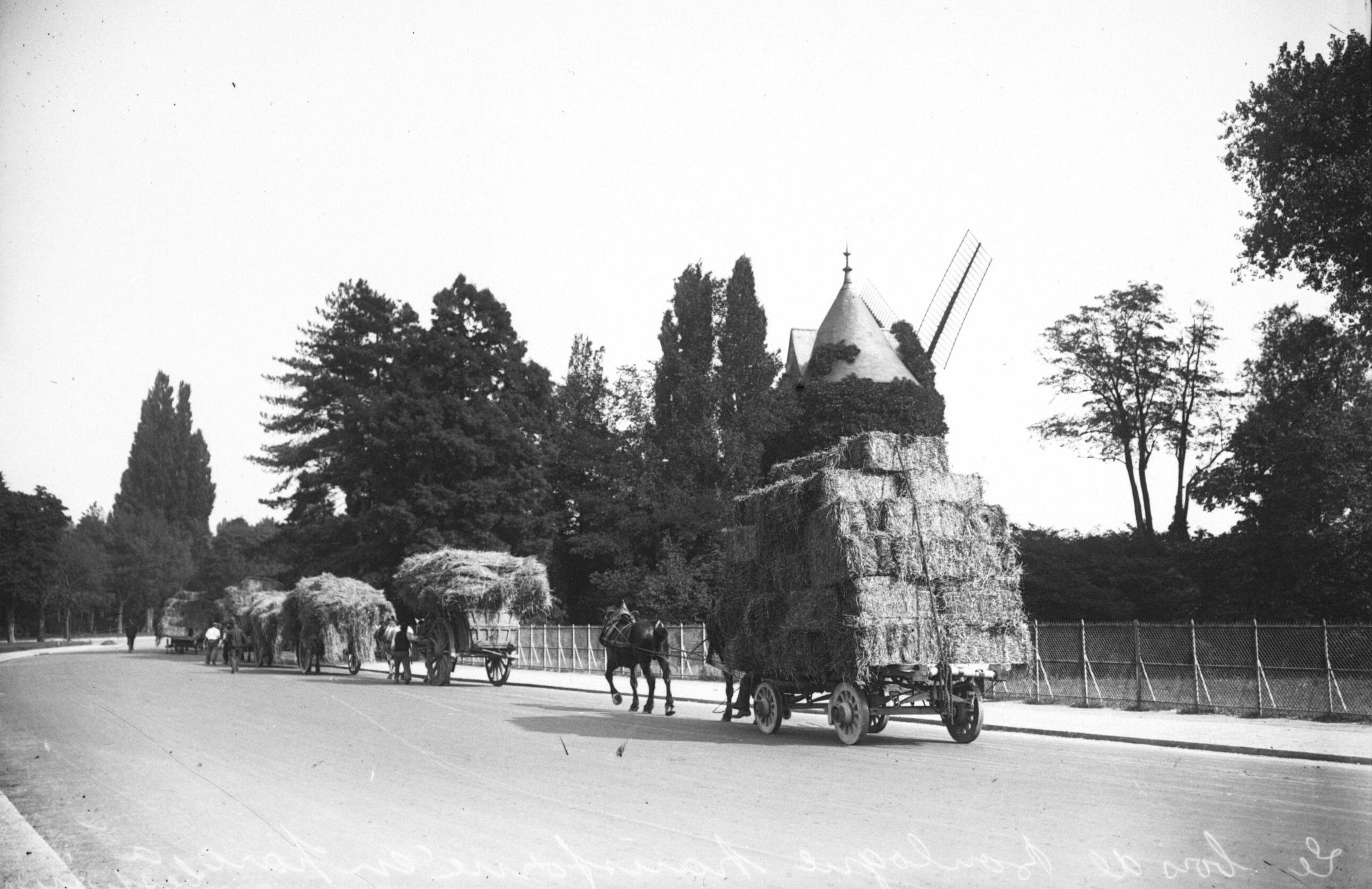 Charrettes de foin dans une allée du bois de Boulogne.